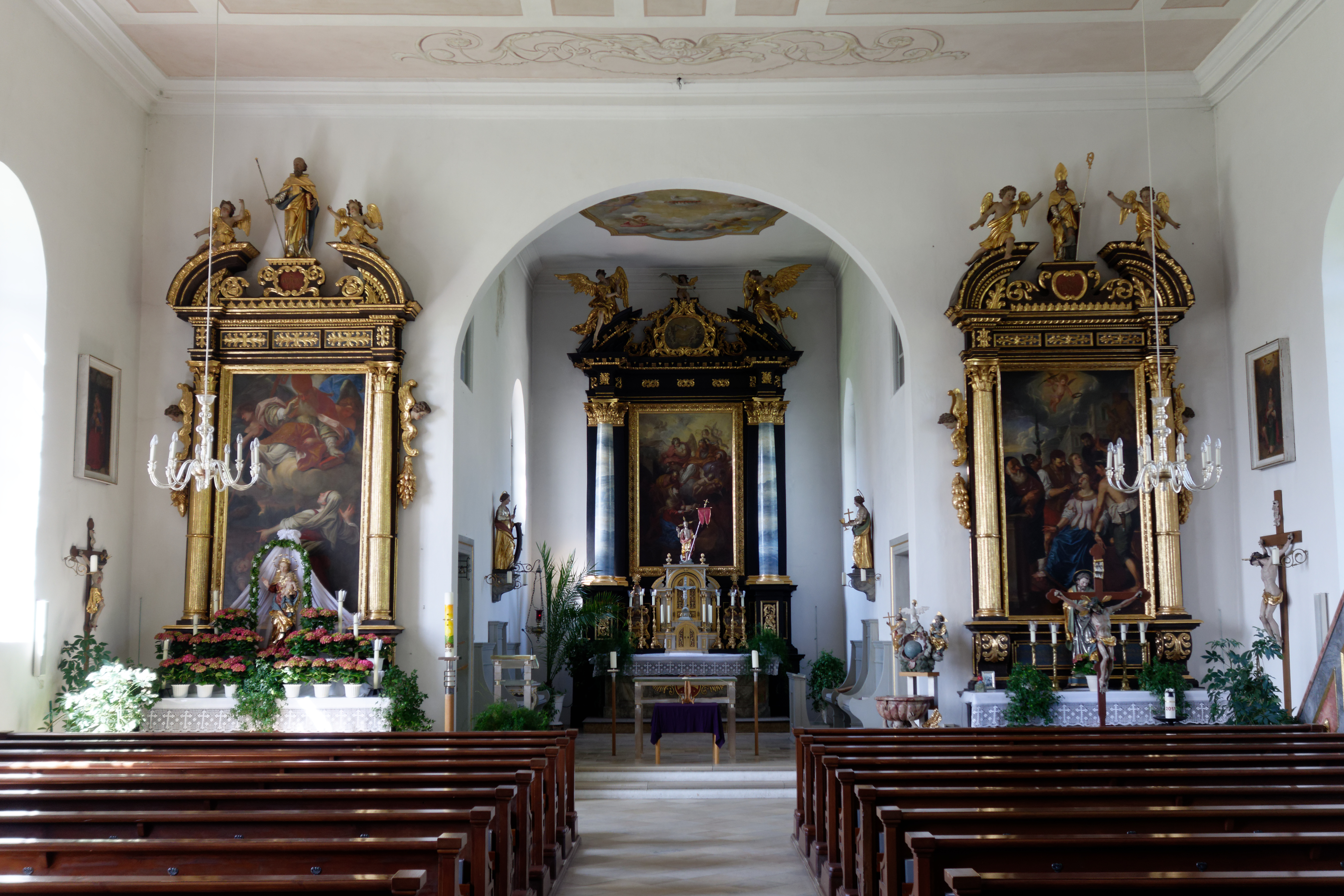 Innenraum der Kirche St. Georg in Bachern bei Friedberg (Bayern)